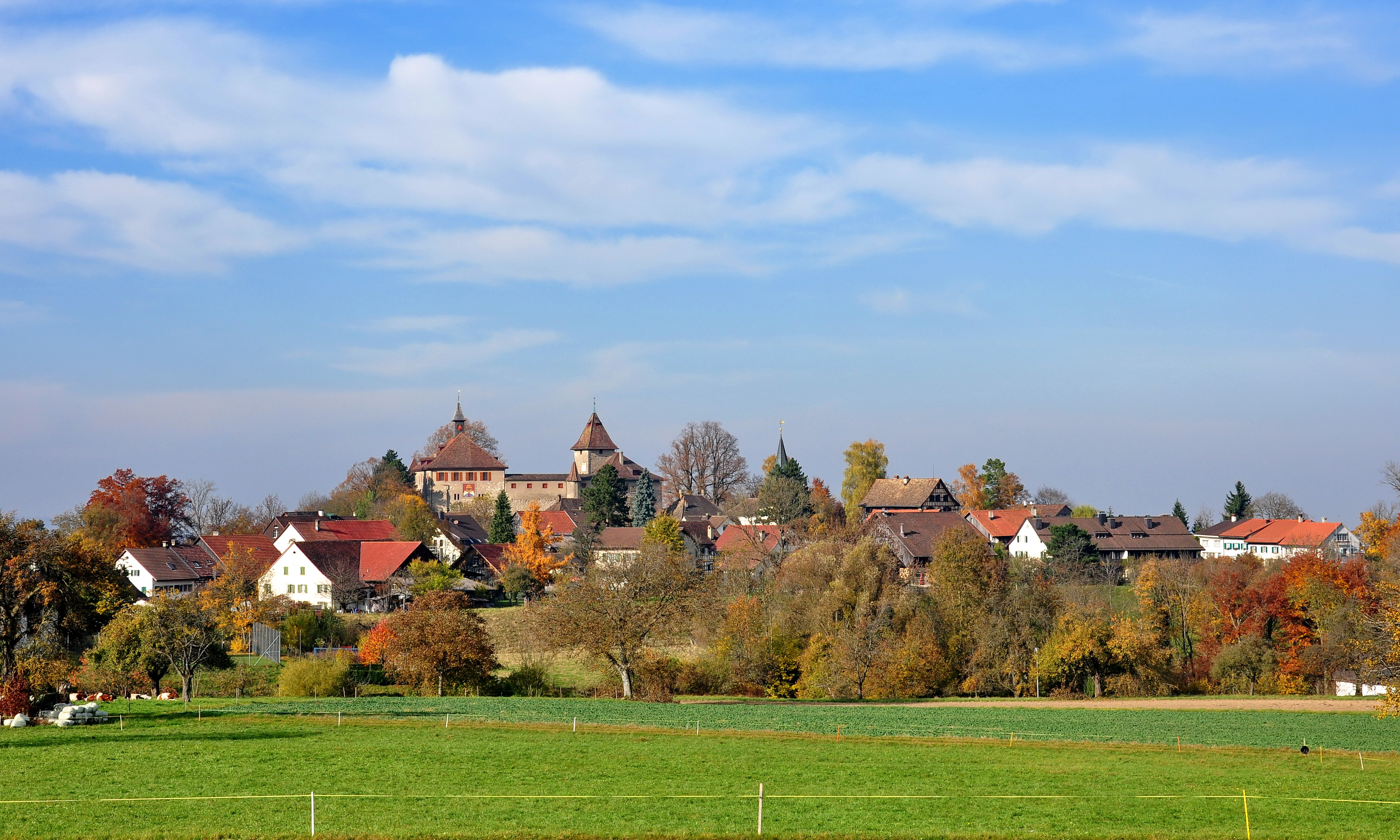 Kyburg (Switzerland)